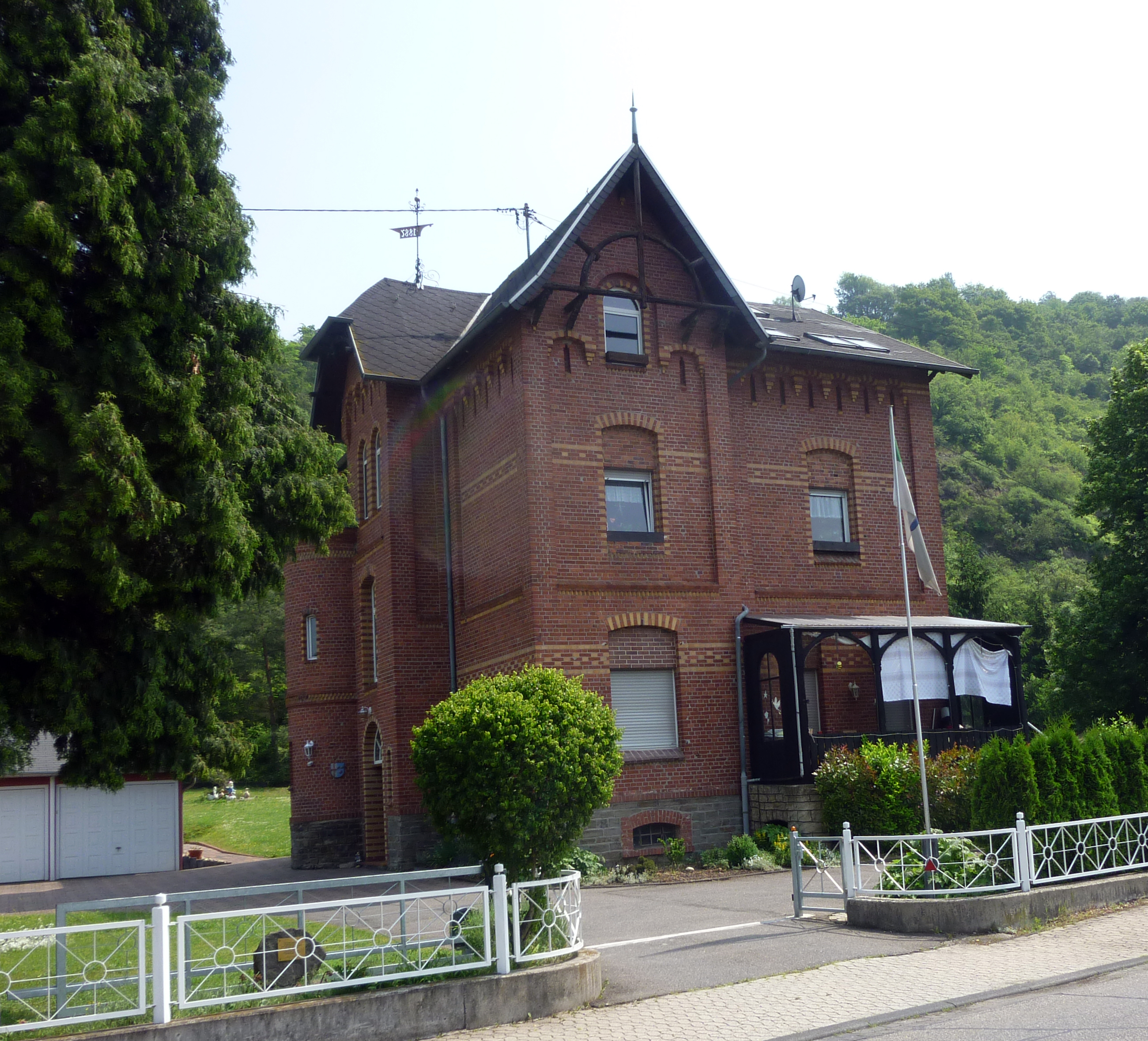 Geburtshaus der Johanna Löwenherz in Rheinbrohl